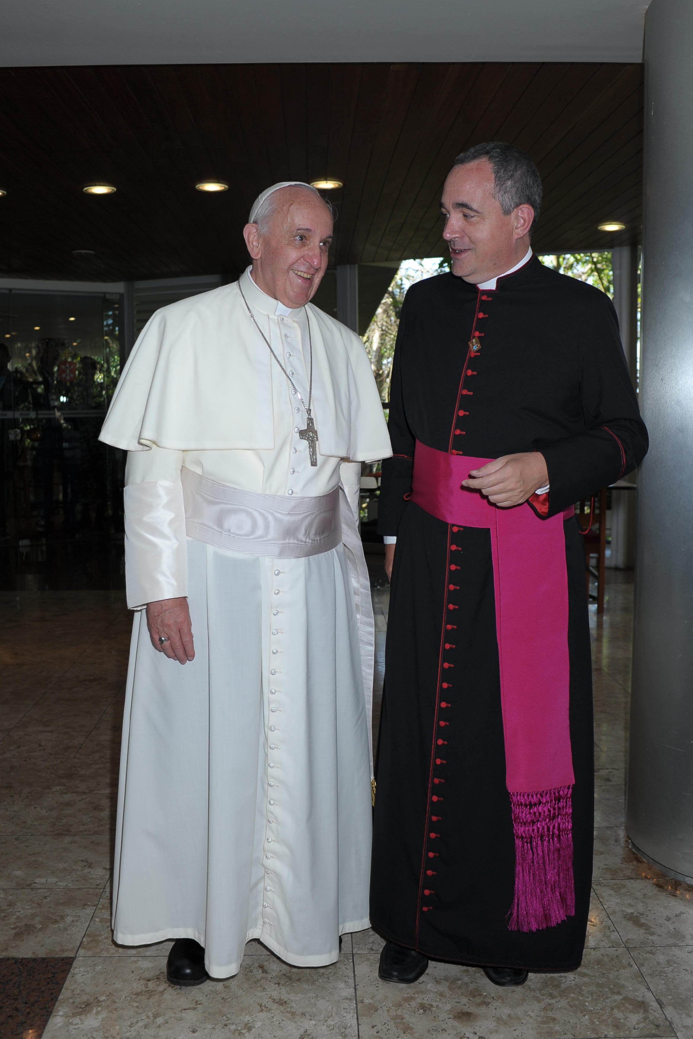 Mons. Piergiorgio Bertoldi in compagnia di Papa Francesco